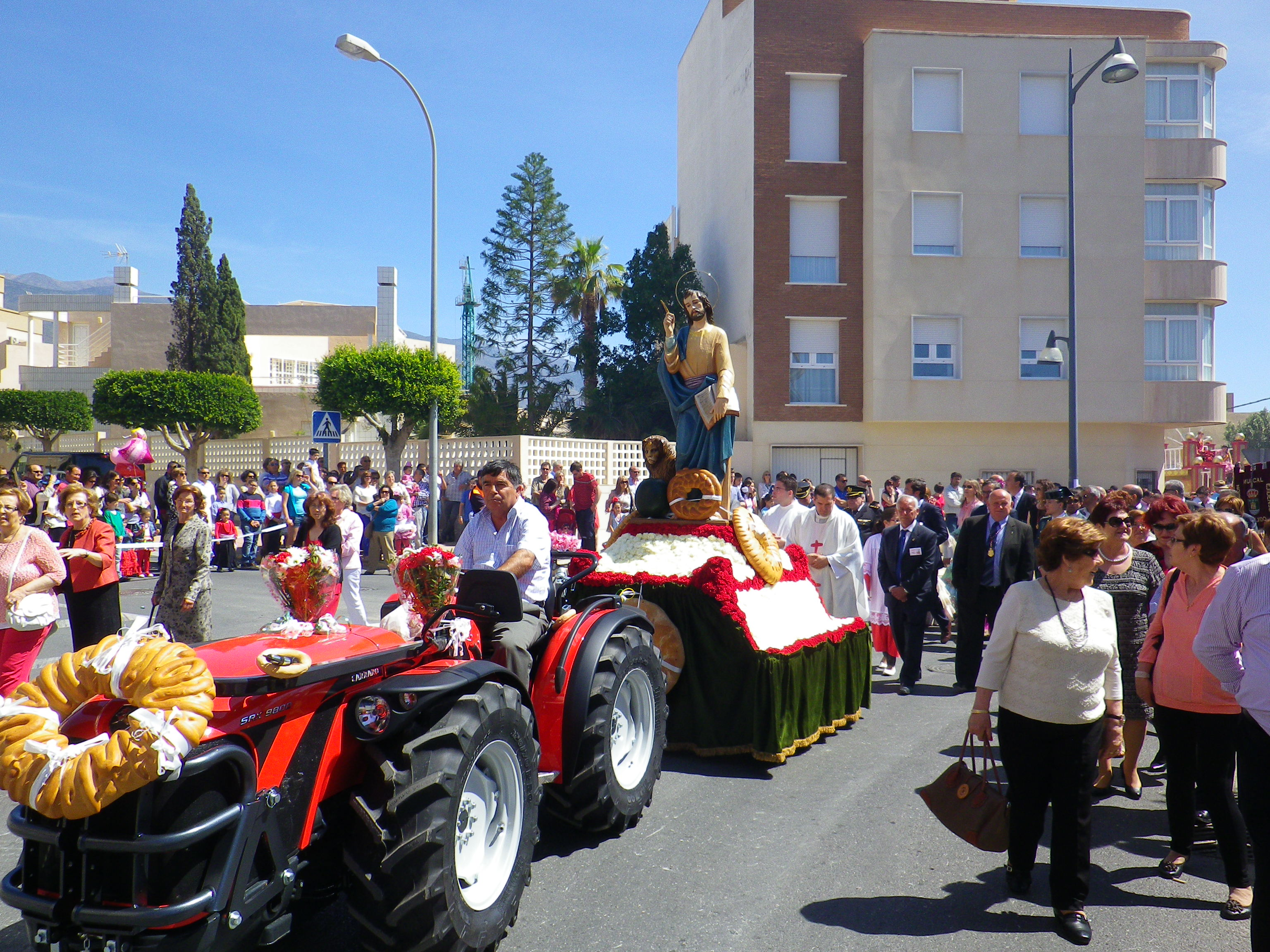 Imagen de San Marcos, patrón de El Ejido, durante la romería en su honor en el año 2014.